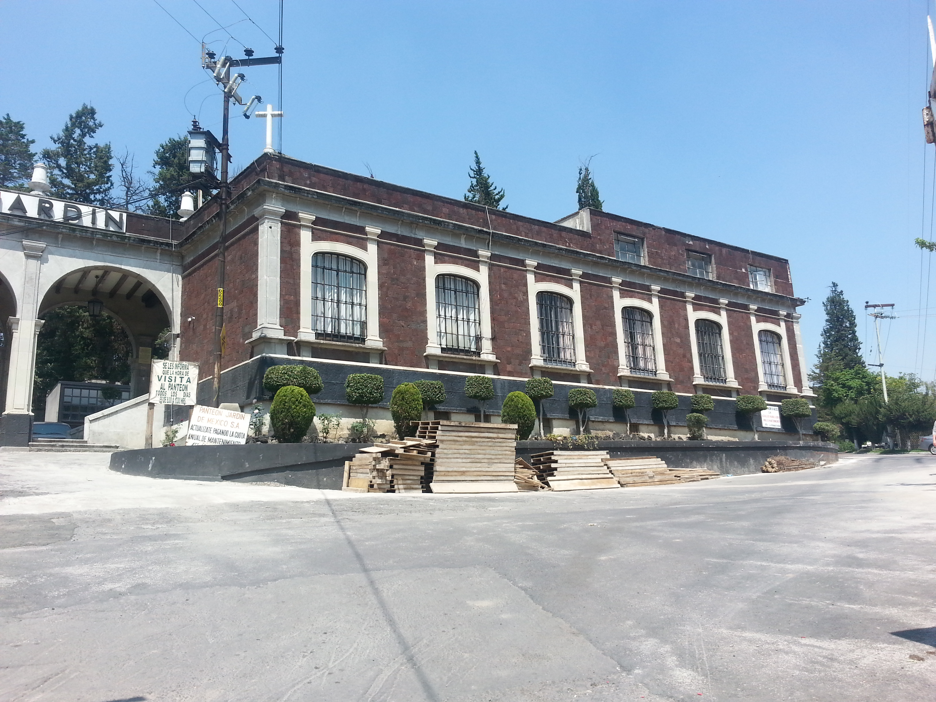 Entrada del Panteón Jardín